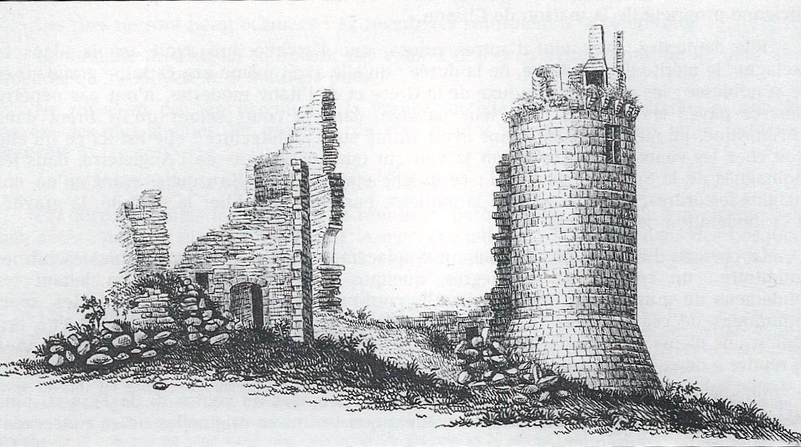 Les ruines du château de Carman (dessin du Chevalier de Fréminville dans Voyage dans le Finistère, livre publié en 1836.